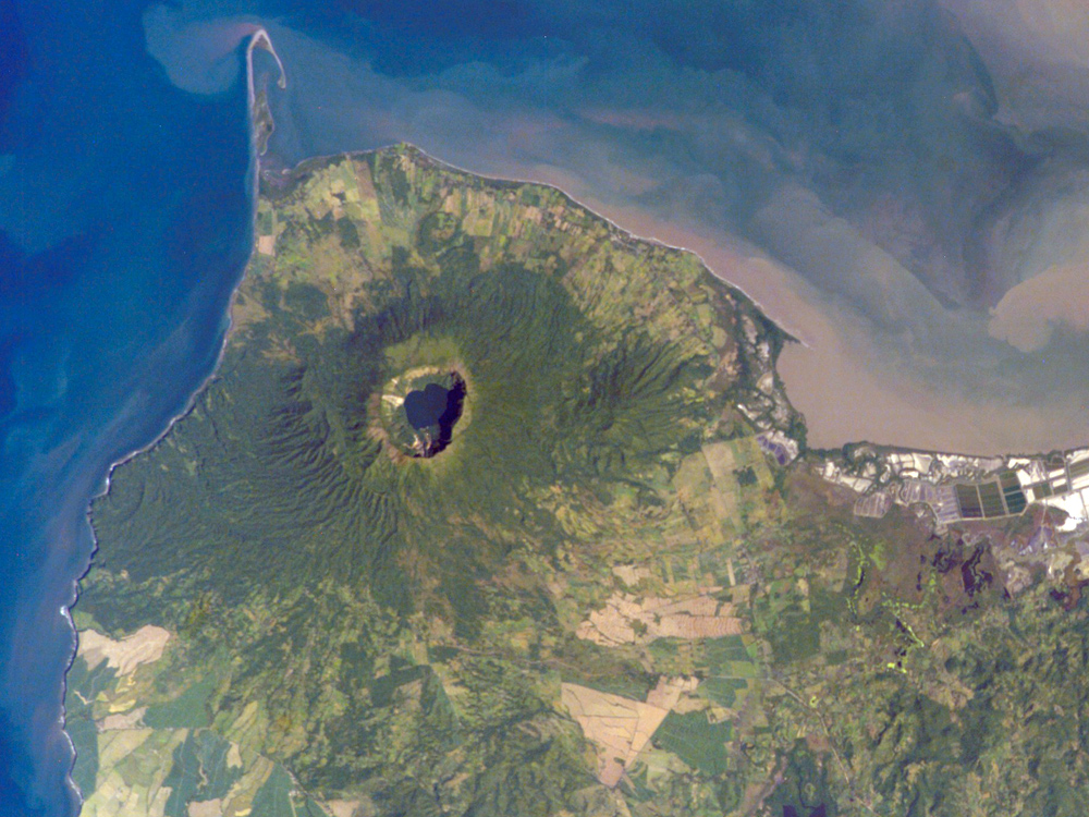 Astronaut photograph of Cosigüina volcano, Nicaragua.